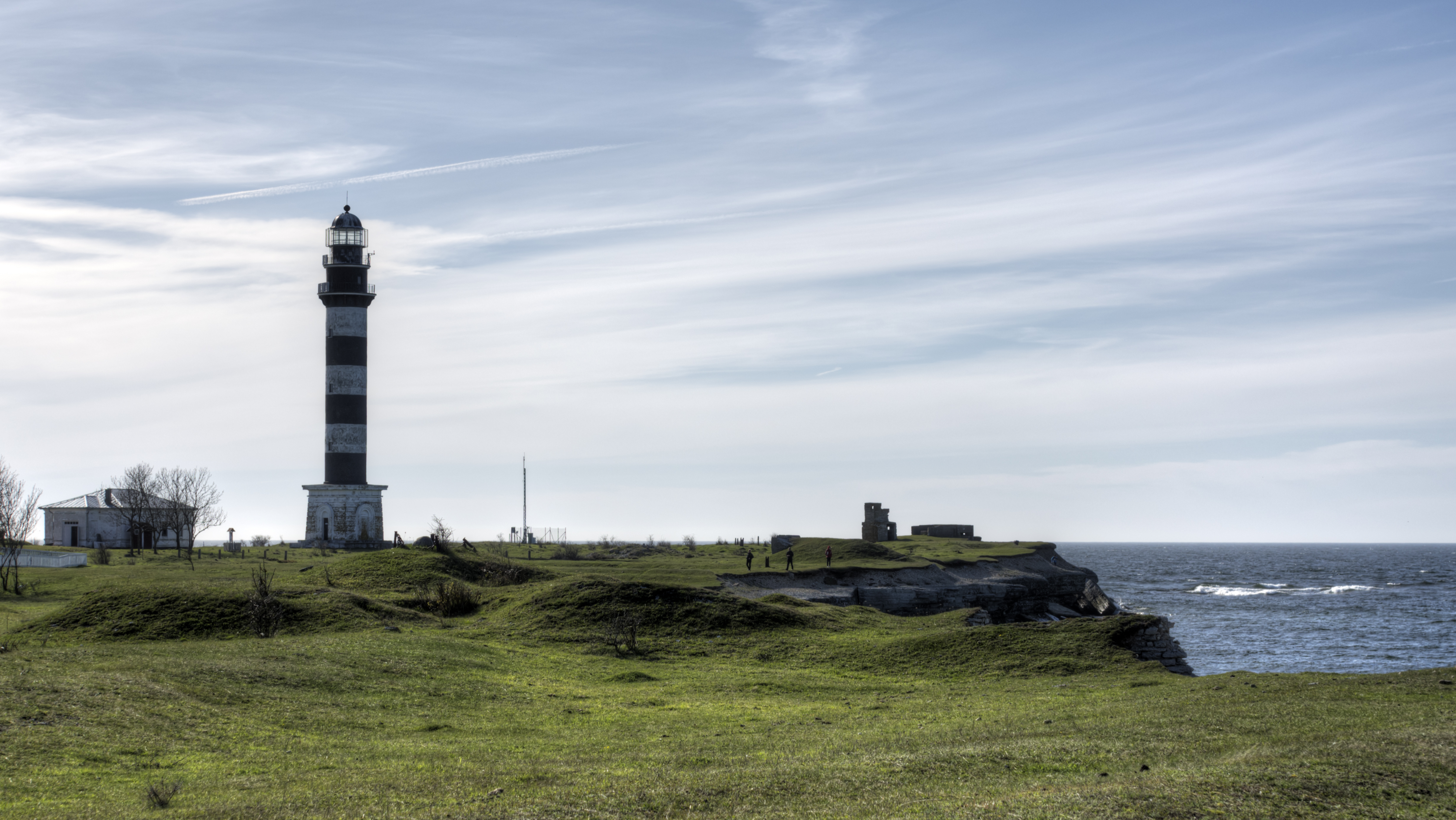 Osmussaare majakas, Nõva-Osmussaare hoiuala (Harjumaa)